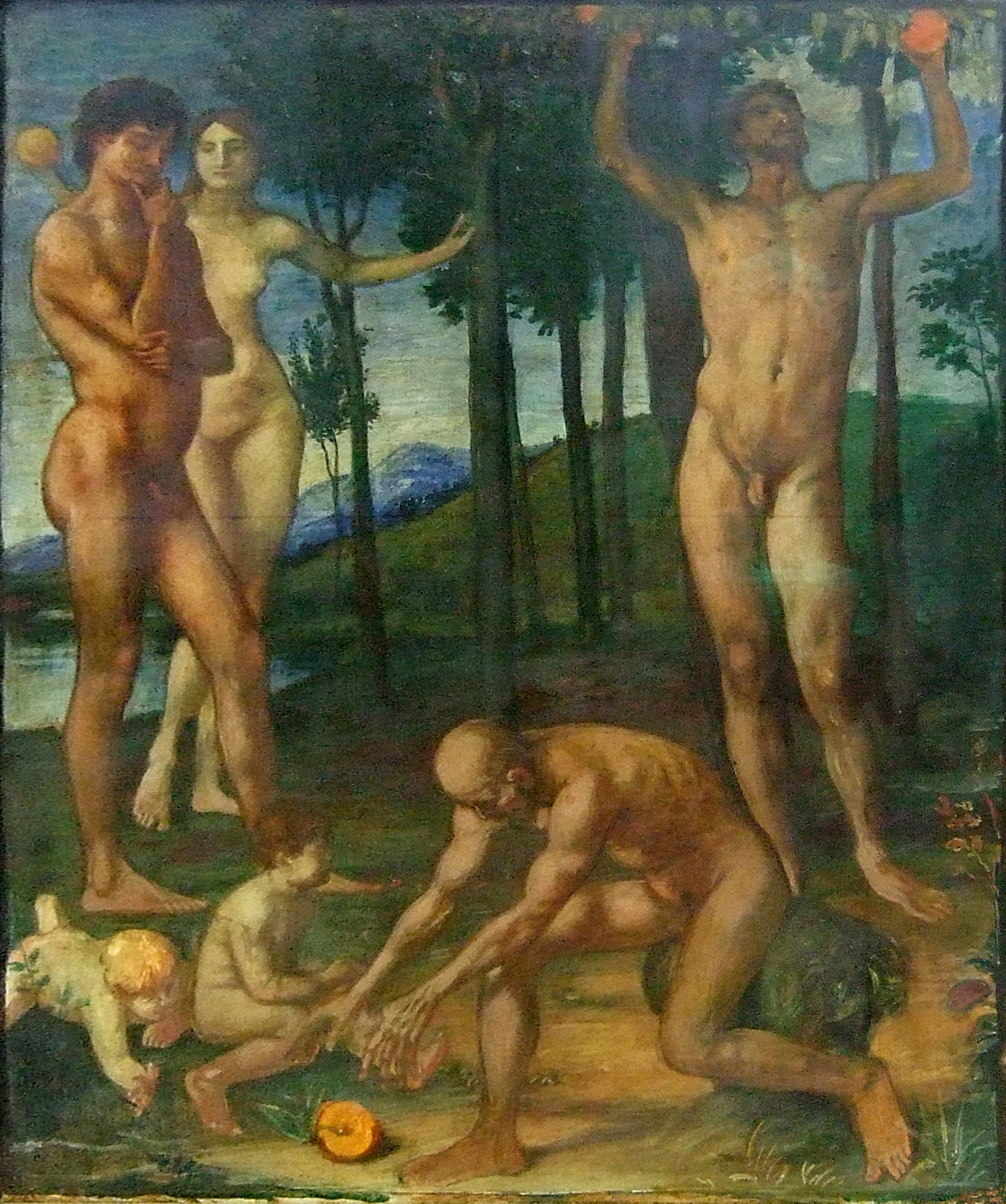 Die Sinnschicht des Orangenpflückers ist hier mit dem Thema der Lebensalter verknüpft; einer der jungen Männer greift in den Baum mit seiner Fülle an Früchten, während der zweite abgelenkt ist, der Greis langt mühsam nach den Früchten, die Kinder achten ihrer kaum.